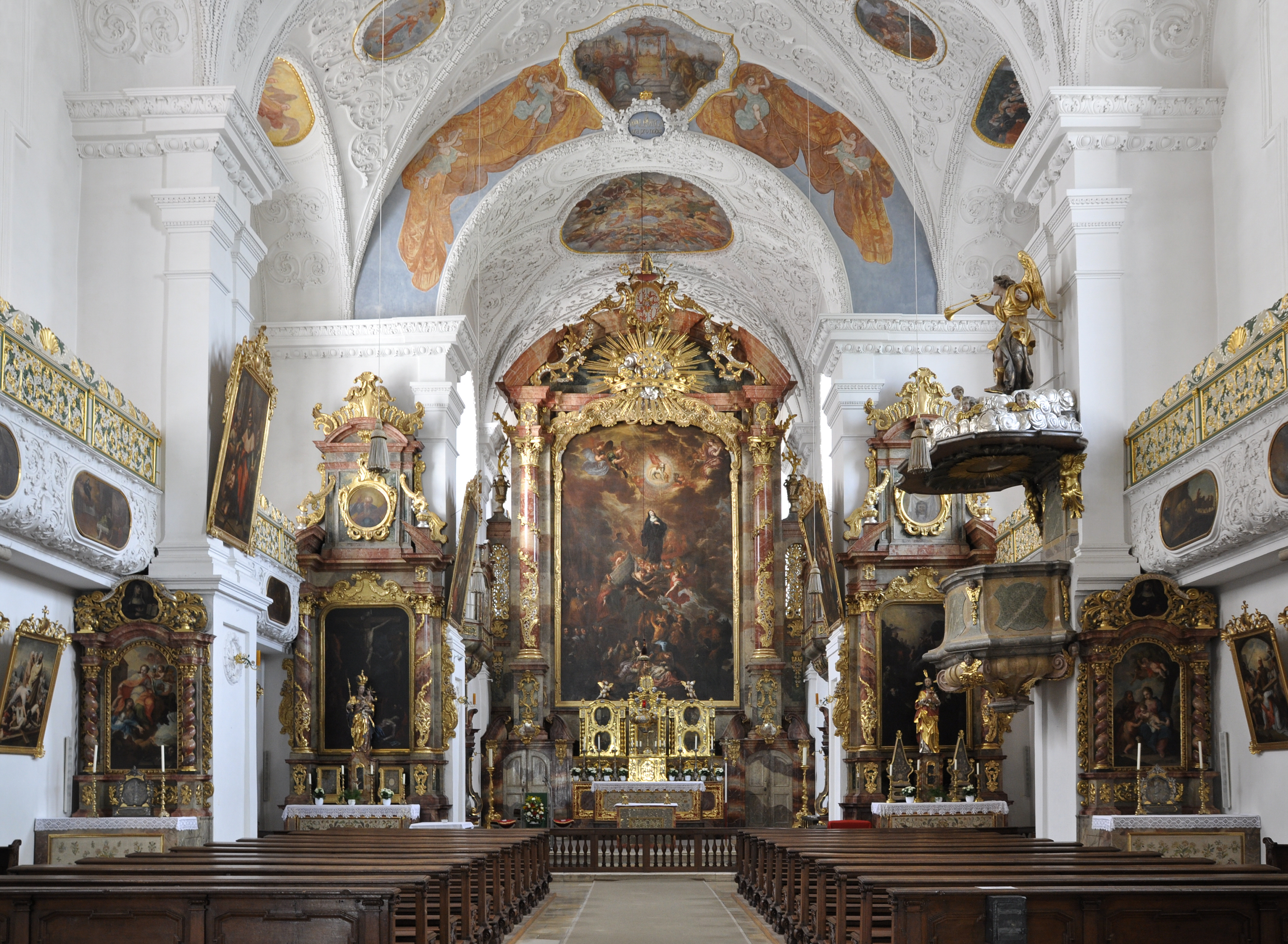 Kircheninneres nach NordostenThis is a photograph of an architectural monument.